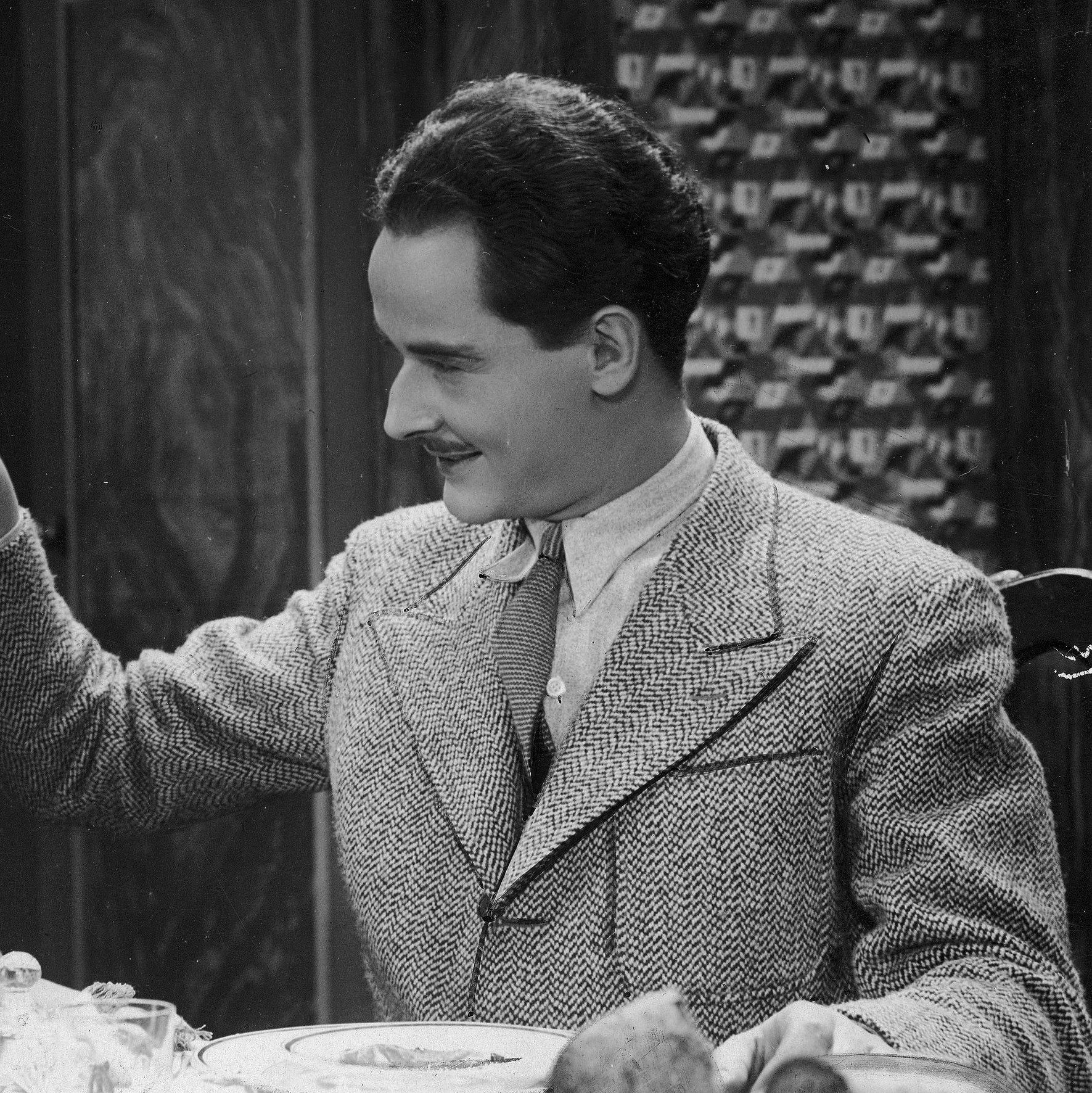 Aktor Zbigniew Sawan jako Henryk Barczyński w filmie Serce na ulicy (1931).